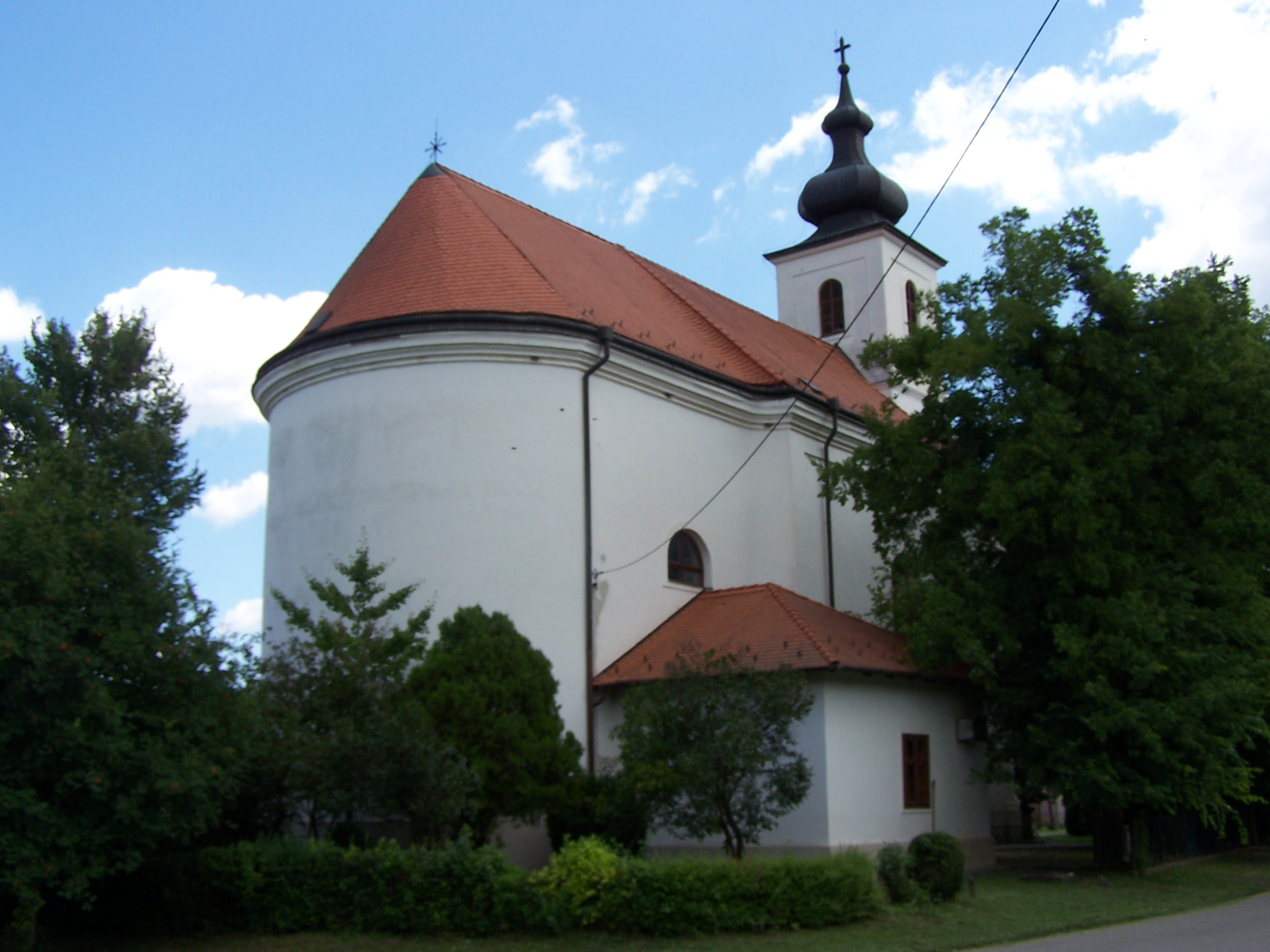 R. k. templom (Mindenszentek) (Heréd, Rákóczi u.)